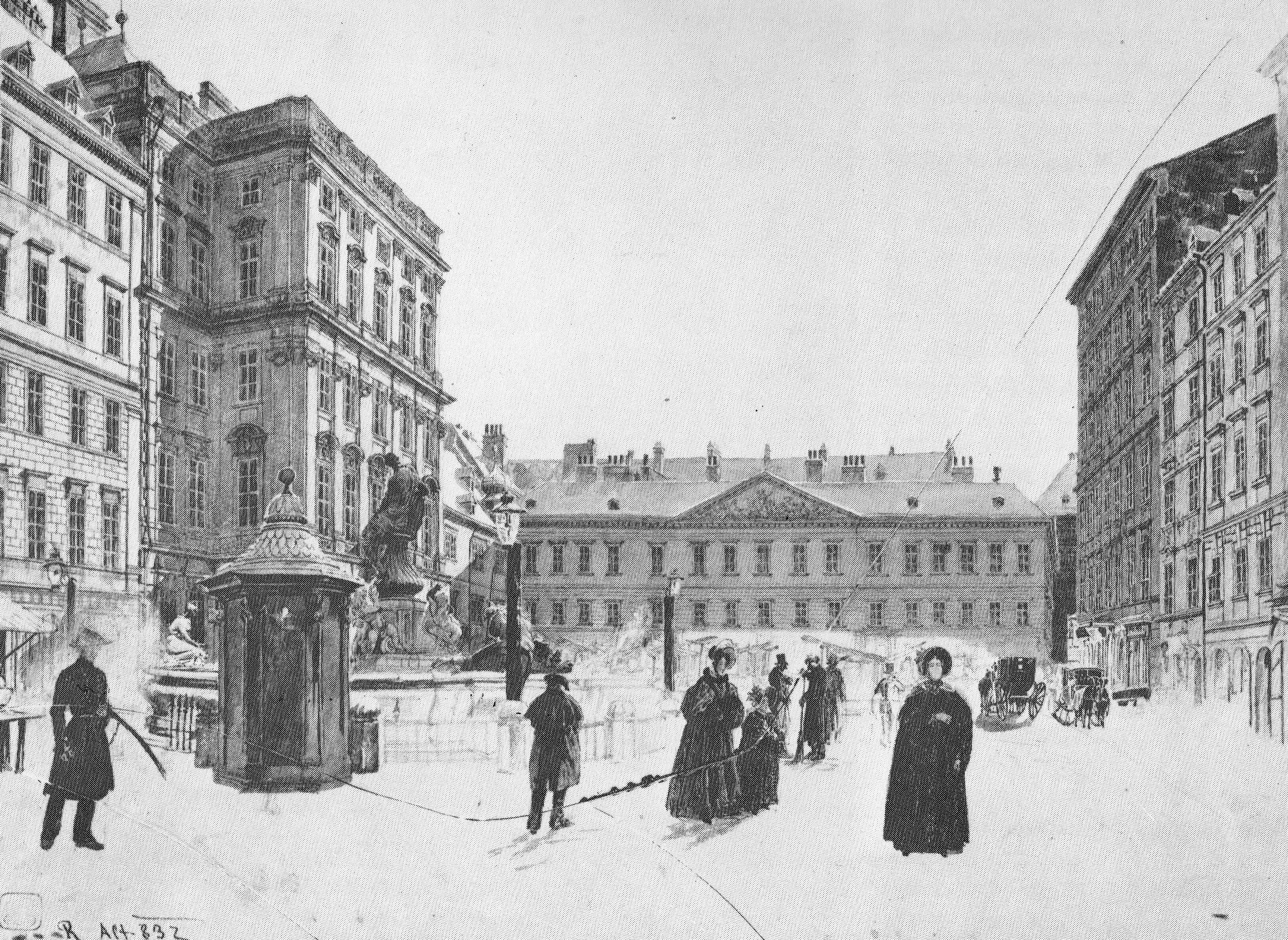 Stadtpalais Schwarzenberg